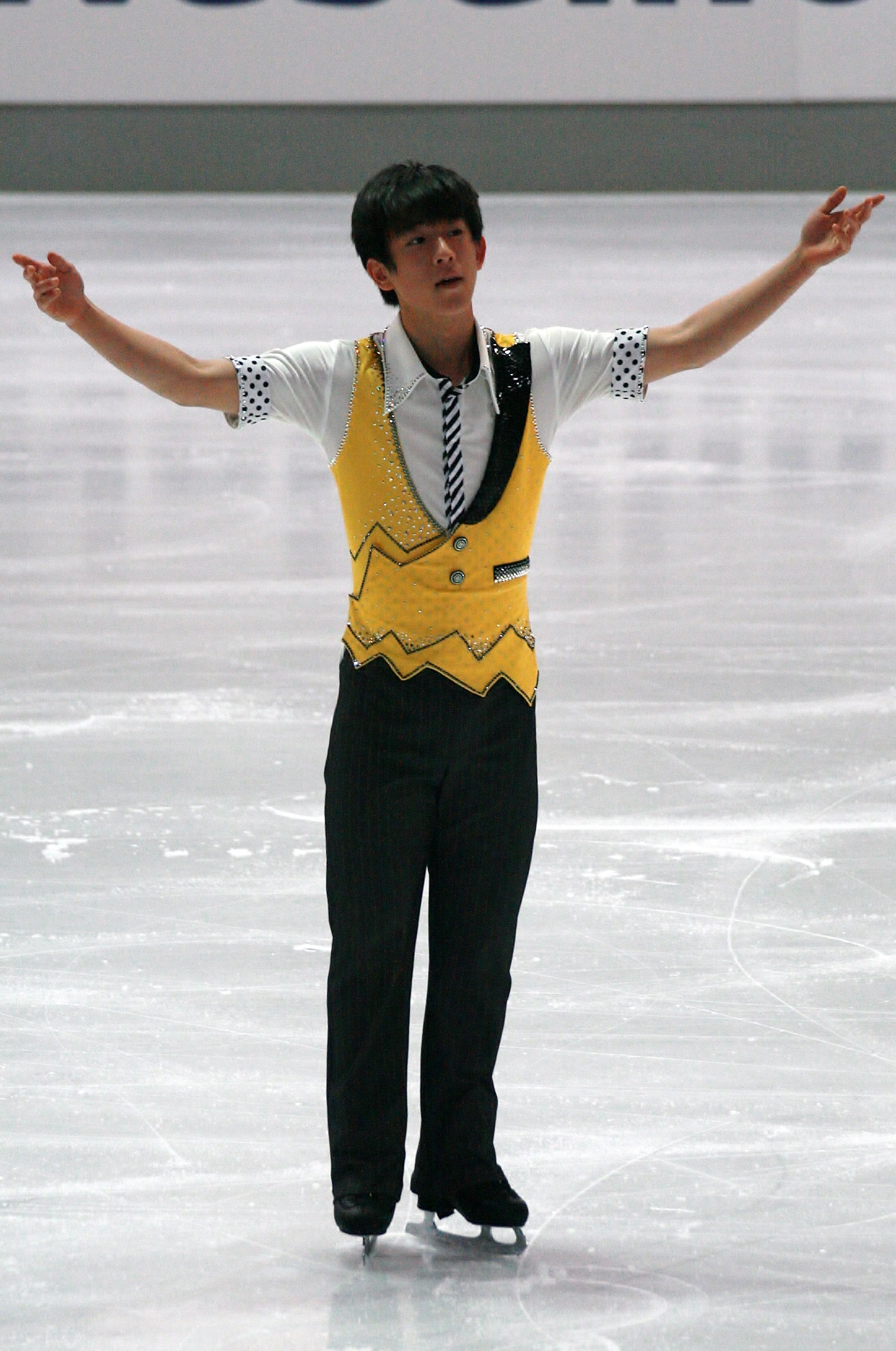 Ким Джин Сео (Южная Корея) на 2013 Nebelhorn Trophy